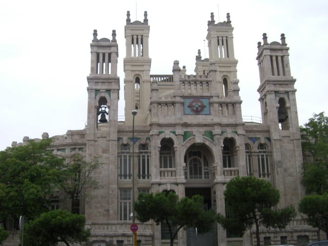 Fachada norte del Hospital de Jornaleros, también conocido como Hospital de Maudes.